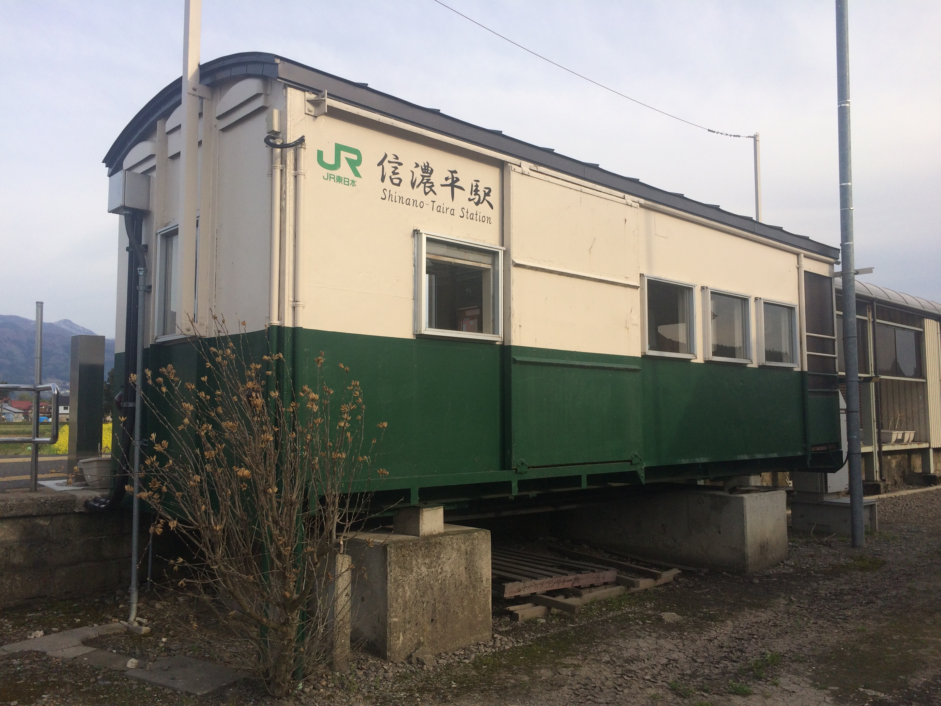 塗装が変更された後の信濃平駅舍 飯山市常盤